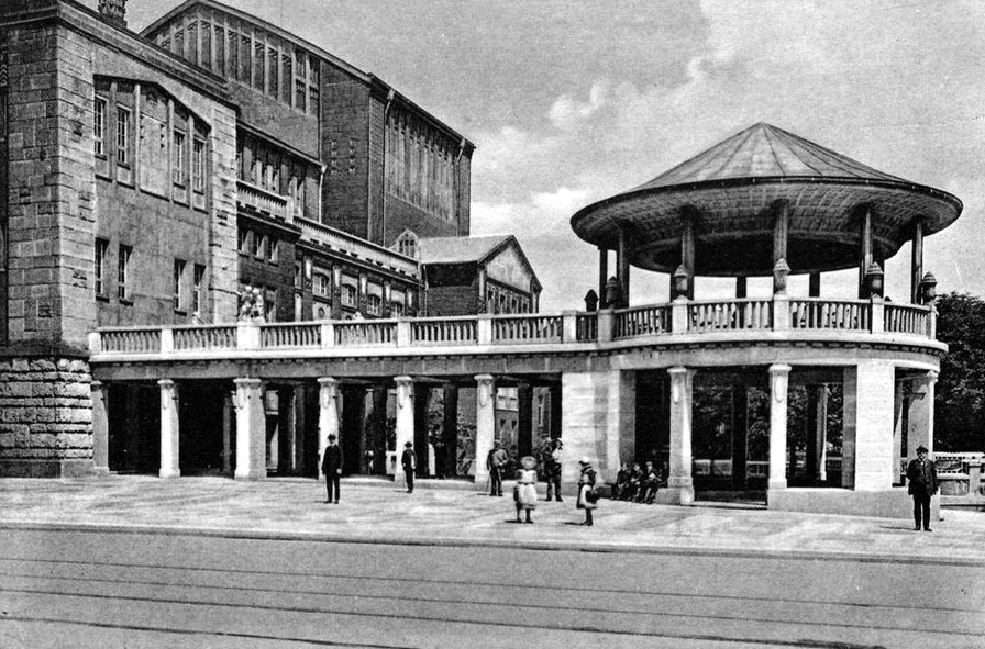 Historische Postkarte, Musikpavillion am Stadttheater